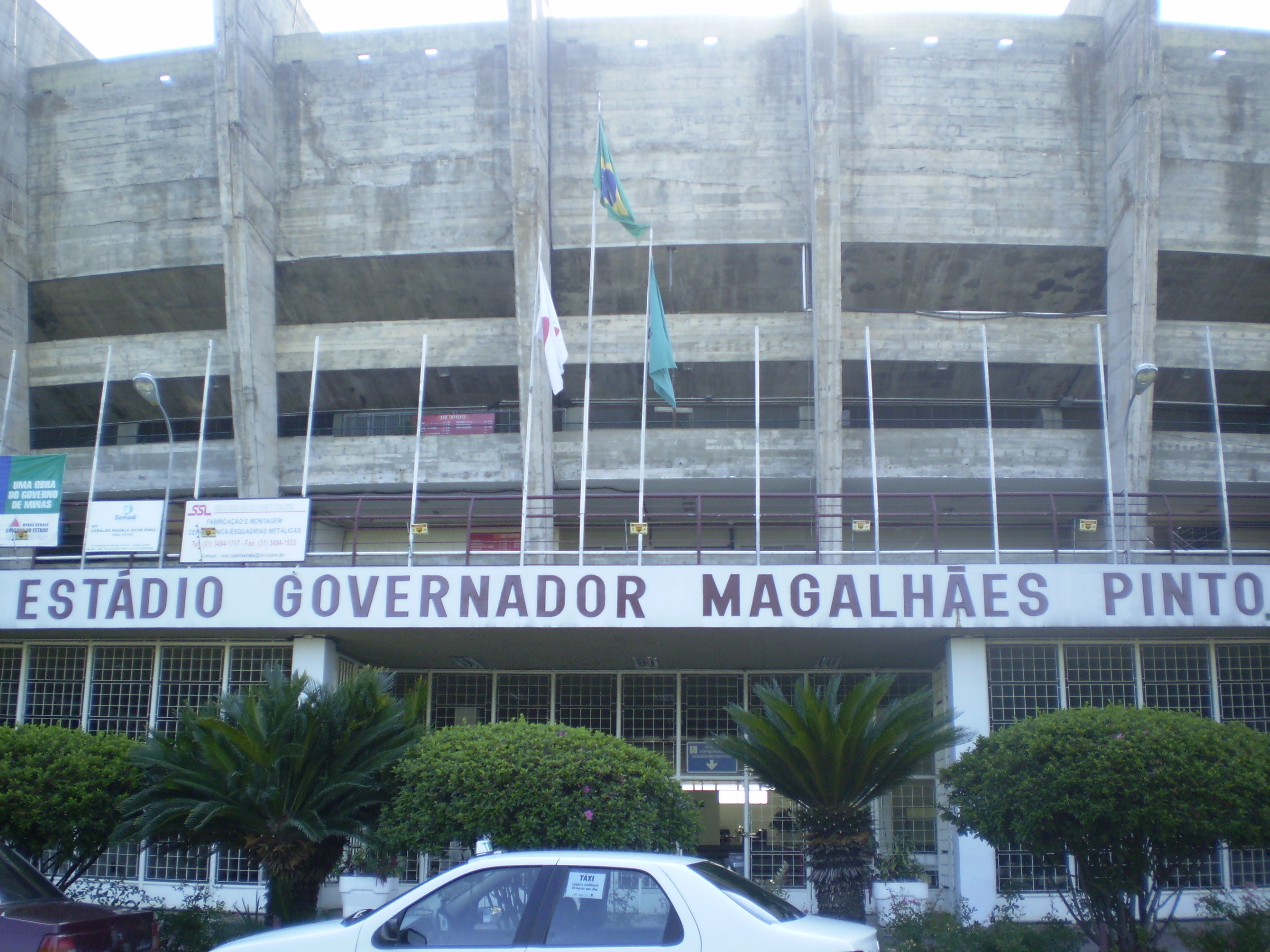 Estádio Mineirão from street level.